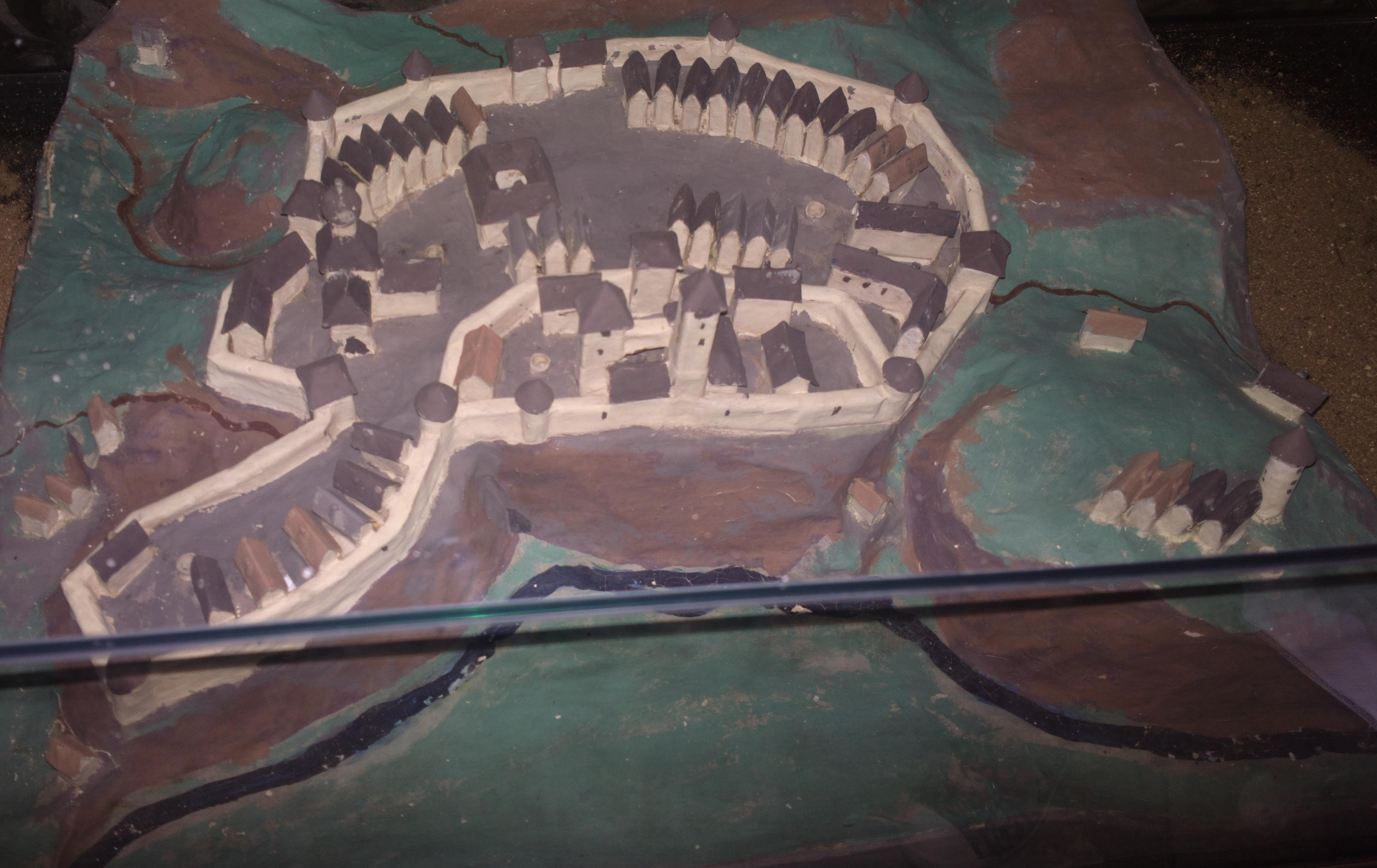 Model Hradu a města Přibyslav v Městské muzeum Přibyslav